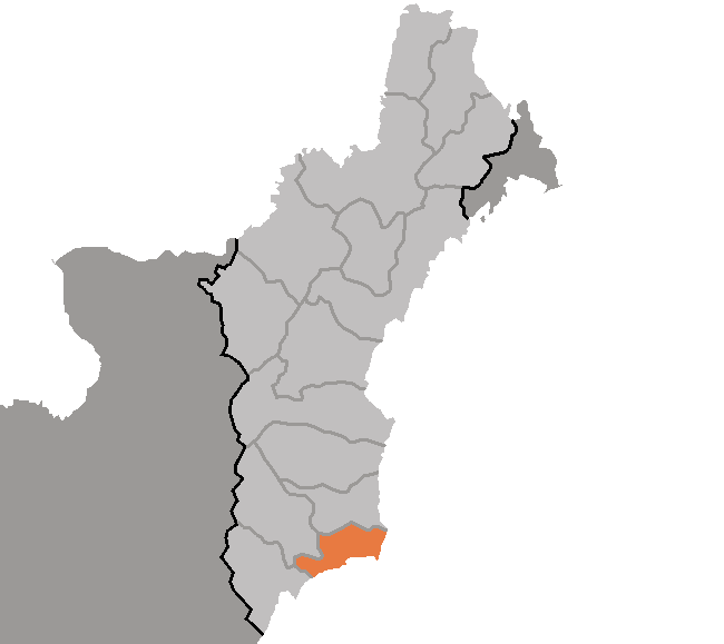 Map of Hwadae, Hamgyong-pukto, DPRK, 2006